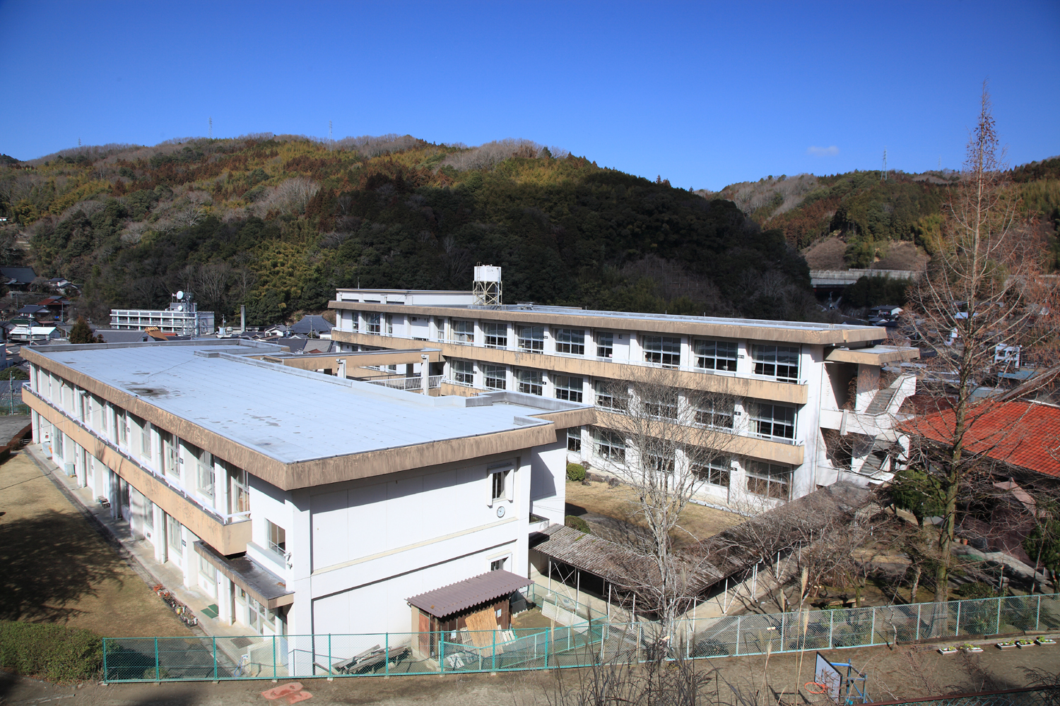 豊田市立足助小学校（豊田市足助町、2012年）